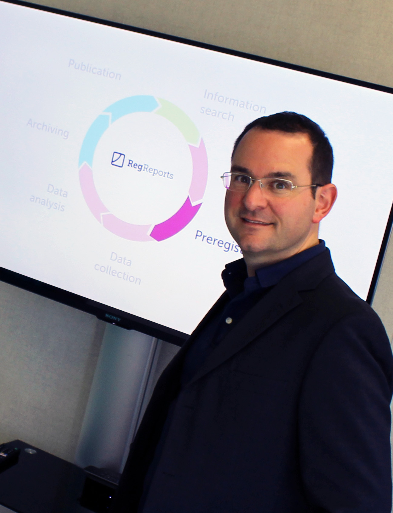 Bild von Michael Bosnjak